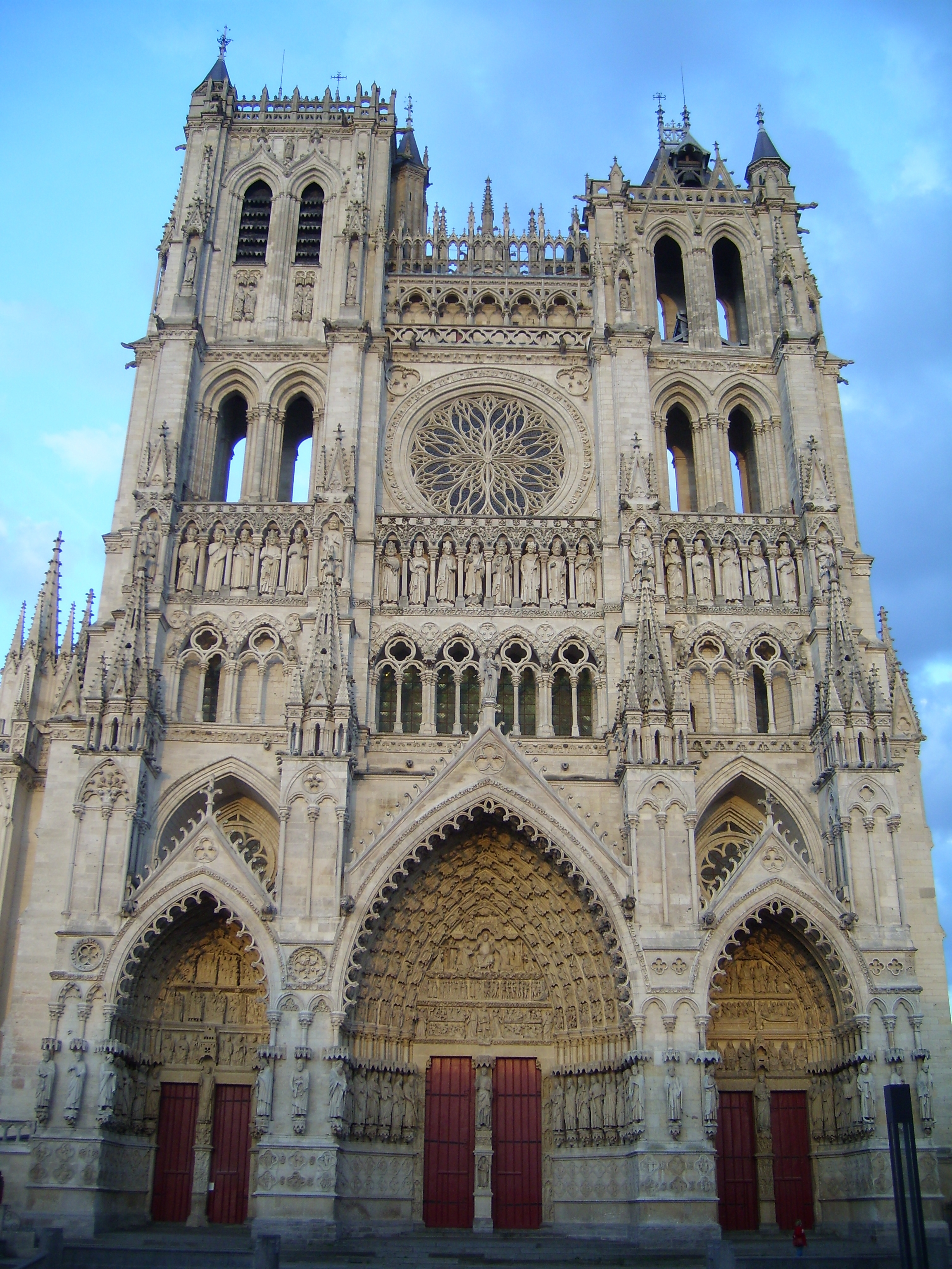 Amiens - Façade de la Cathédrale Notre-Dame d'Amiens.